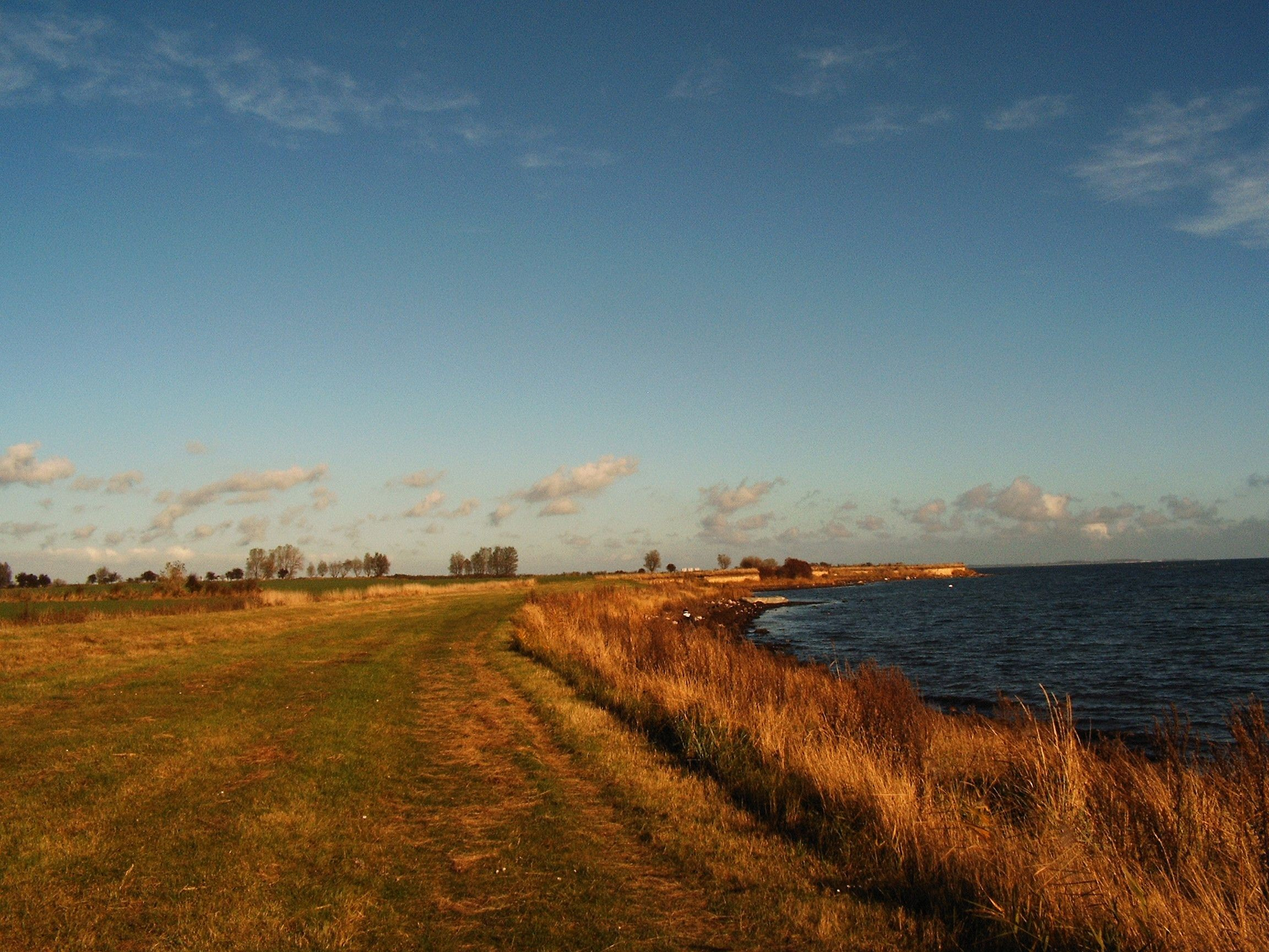 Küste Großenbrode mit Blick auf Fehmarn (Häuser von Burgtiefe in Bildmitte)